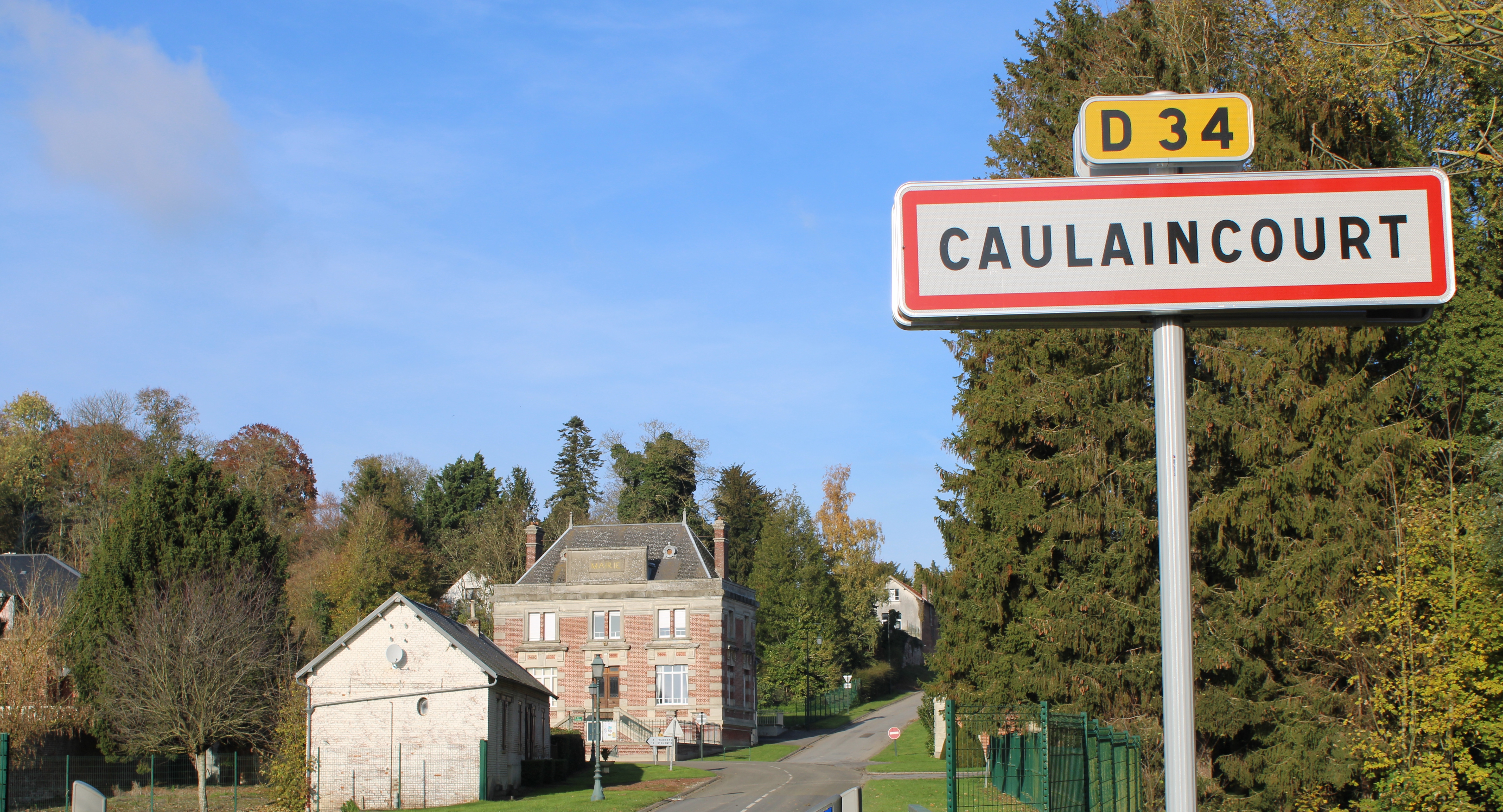 Entrée du village